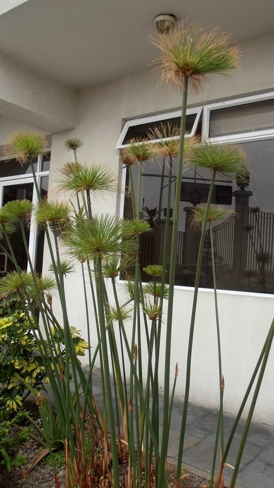 Antofagasta